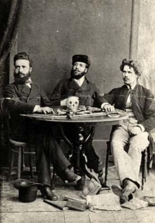 Христо Ботев, Никола Славков и Иван Драсов в Румъния, 1875 г.